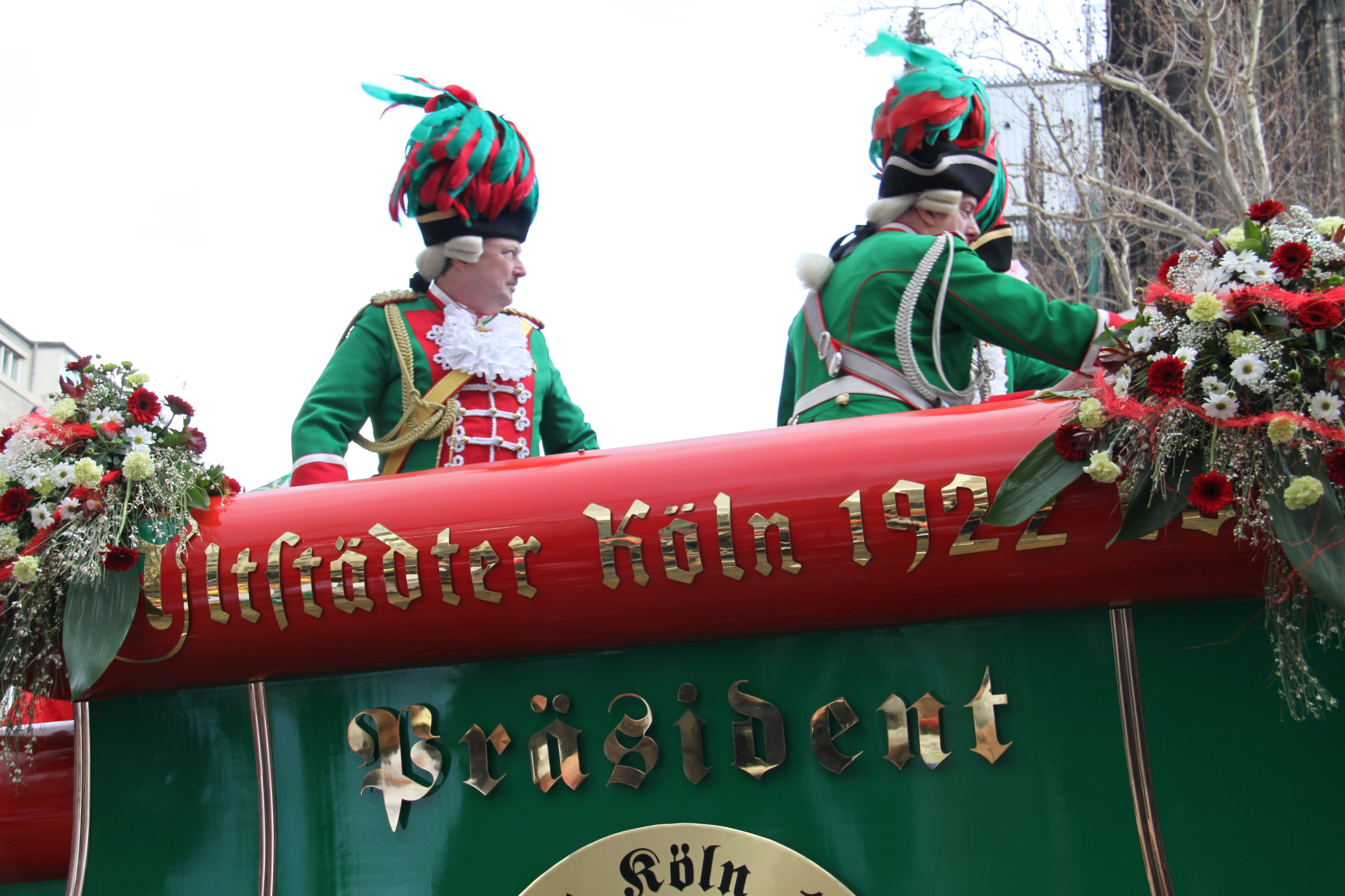 Rosenmontagszug Köln 2012